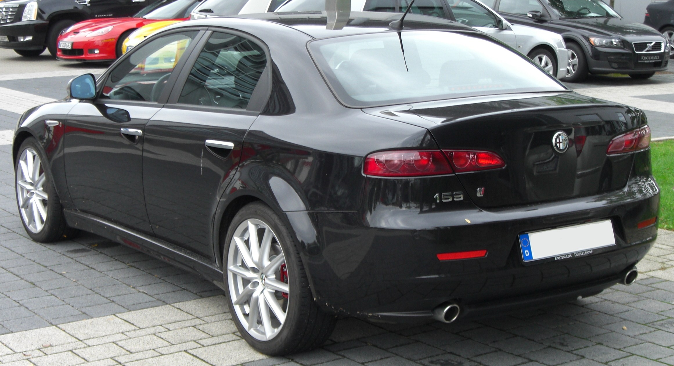 Alfa 159